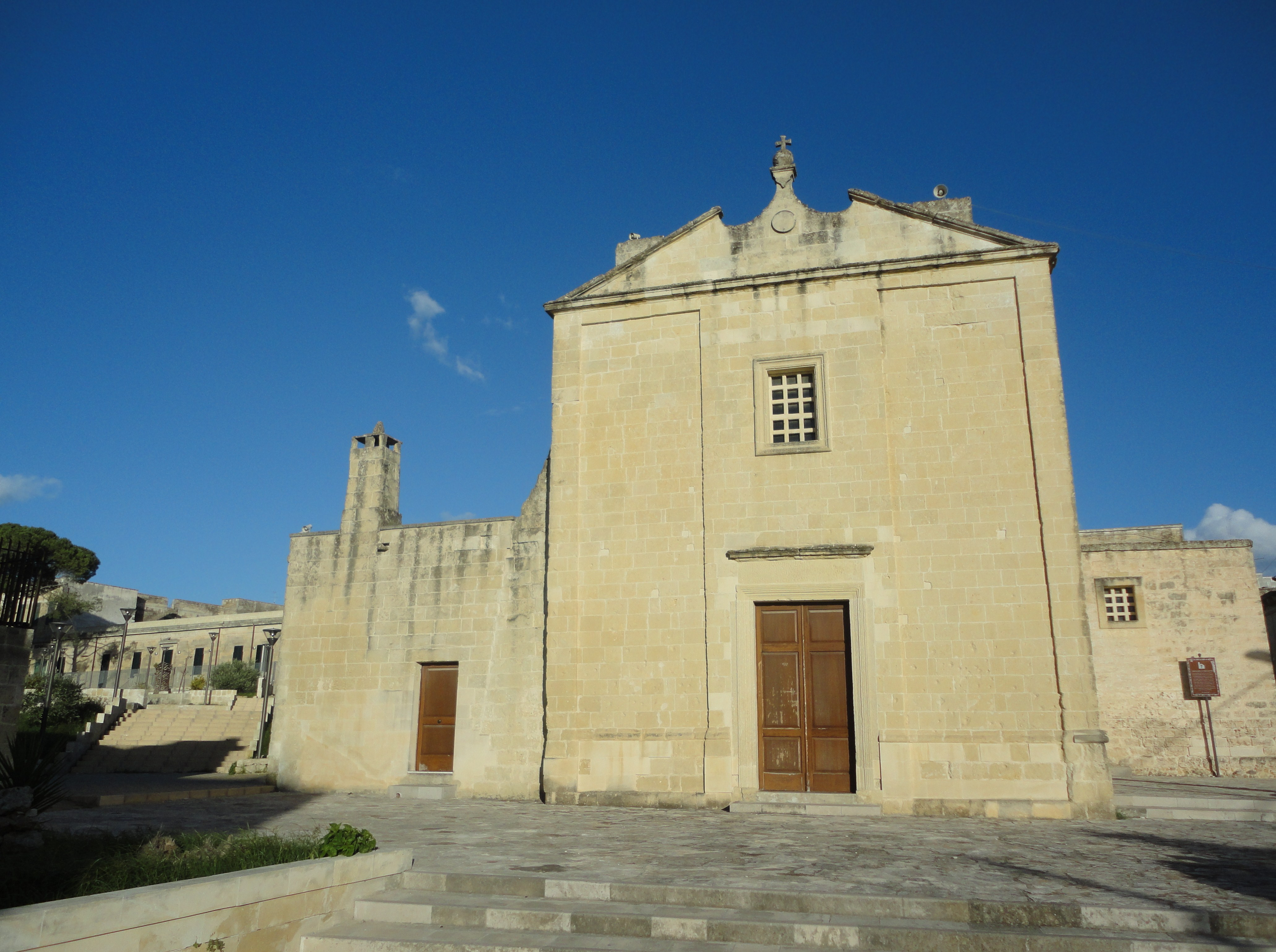 Chiesa della Visitazione Vernole, Lecce